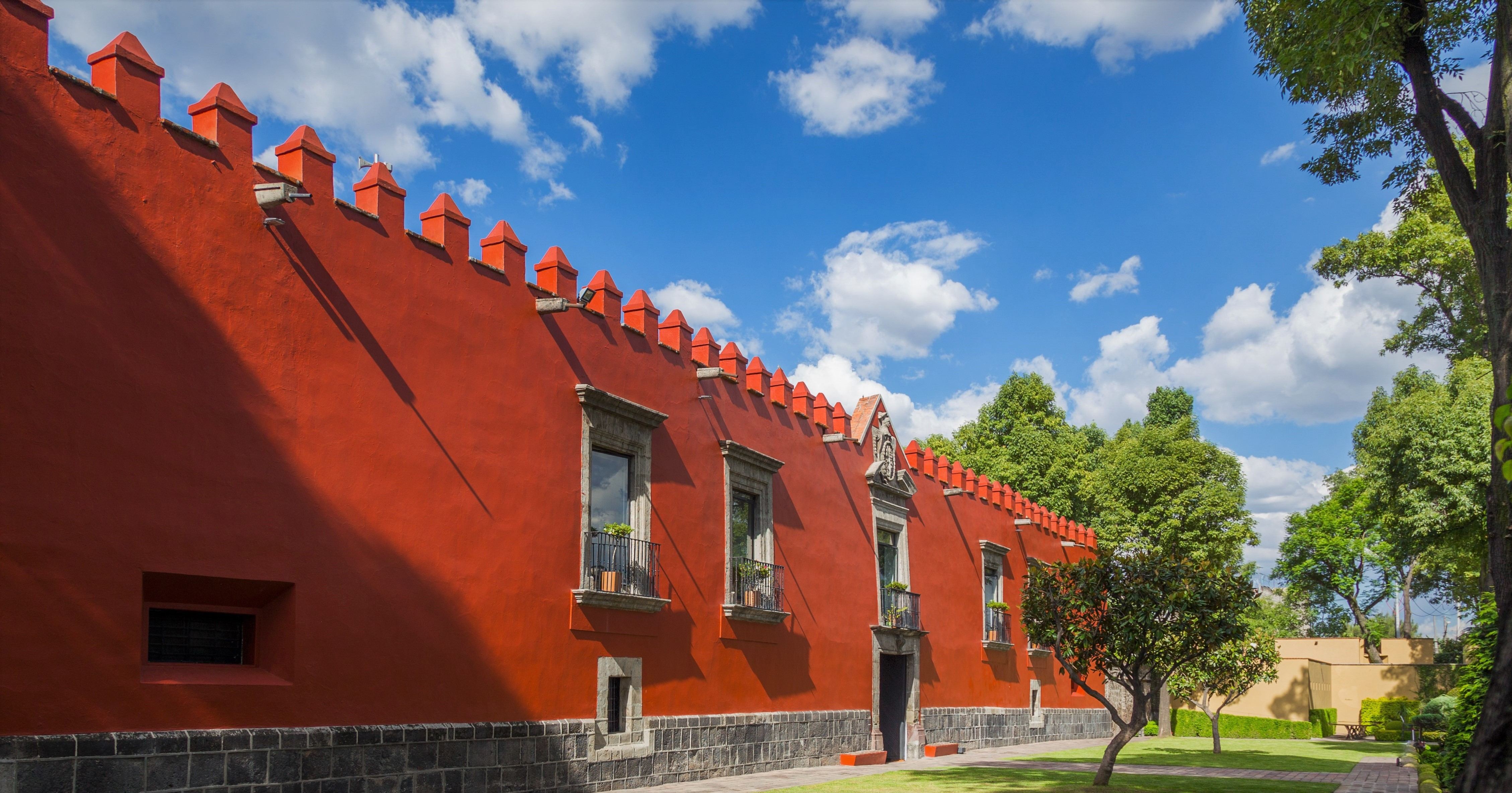 Sede Ciudad de México del IPADE que usa el antiguo casco de la hacienda de San Antonio de Clavería